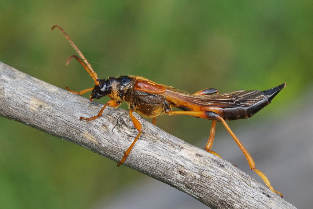 Самец усача Necydalis major. Россия, Волгоградская обл., Камышинский р-н, Щербаковская балка.